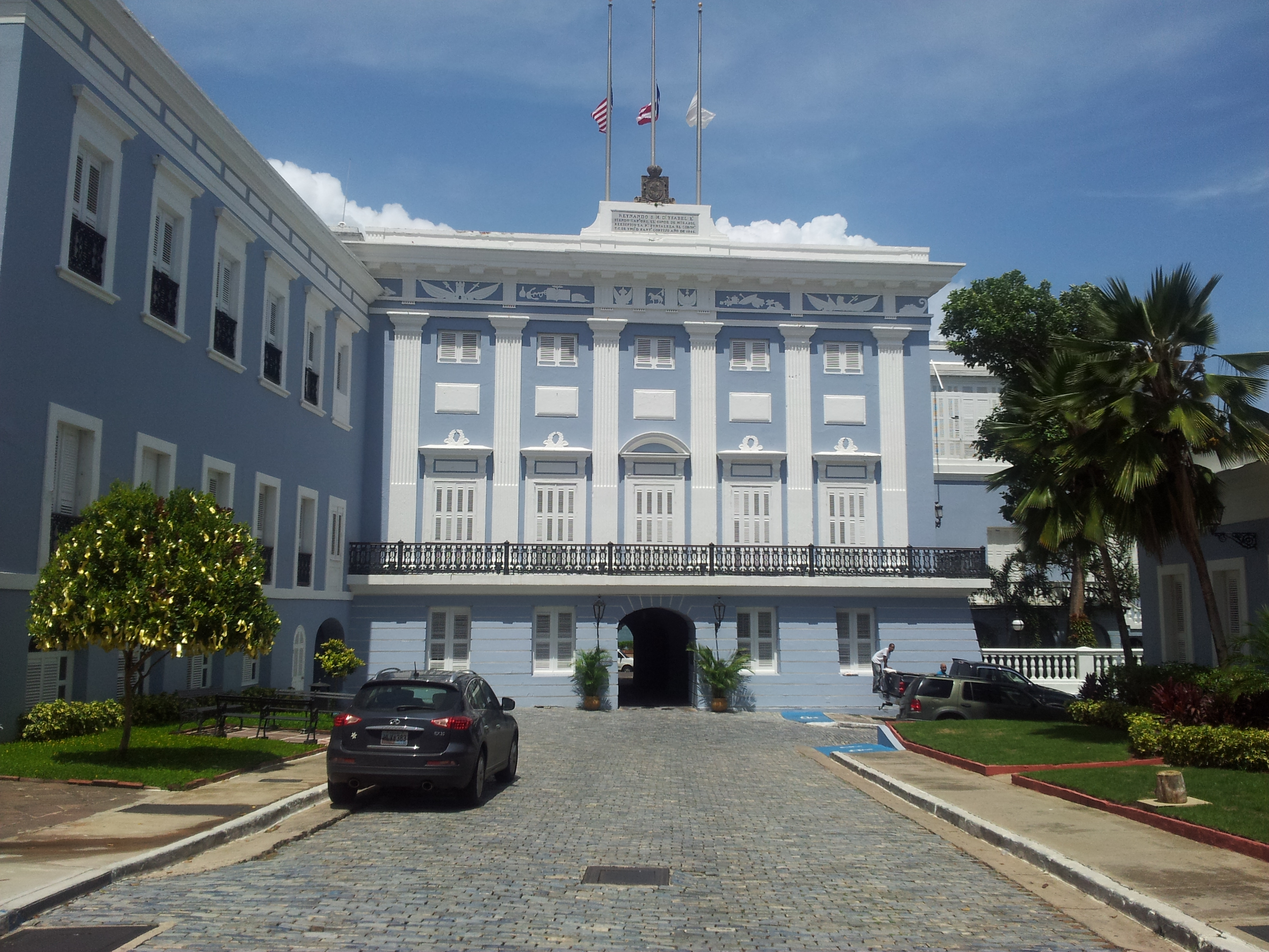 La Fortaleza en el Viejo San Juan, Puerto Rico.